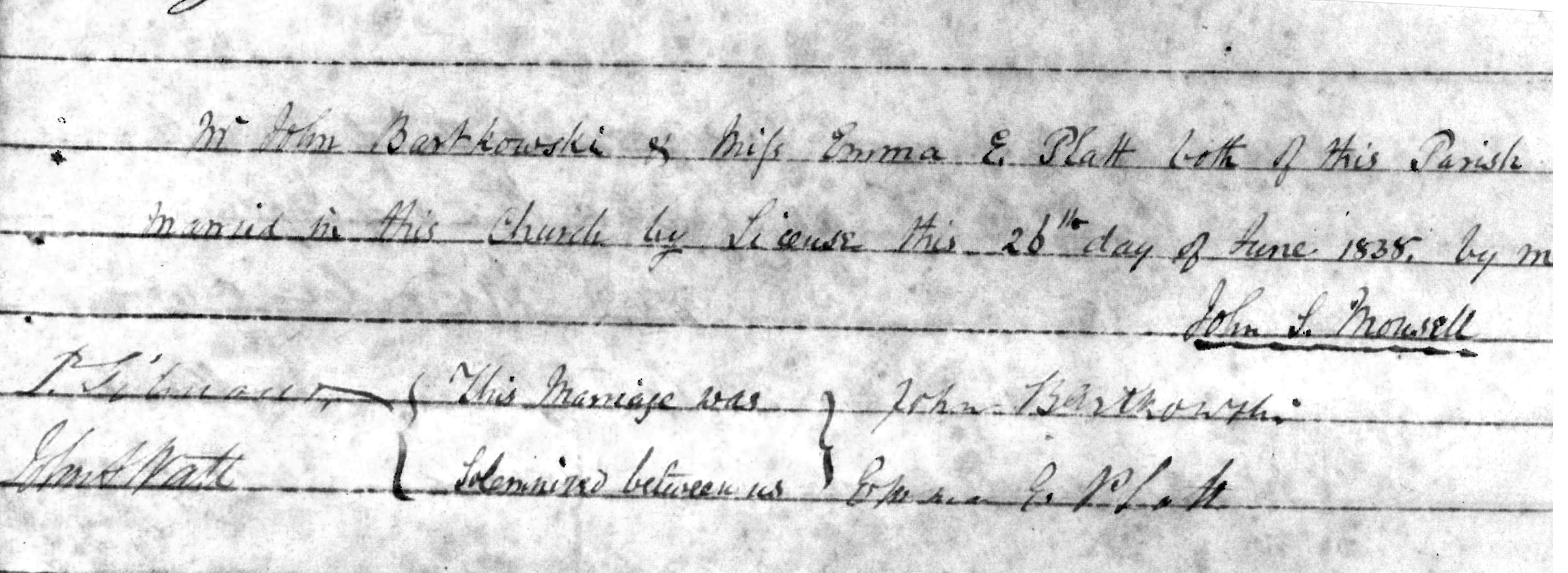 Certificate of marriage between Jan Bartkowski and Emma Platt.